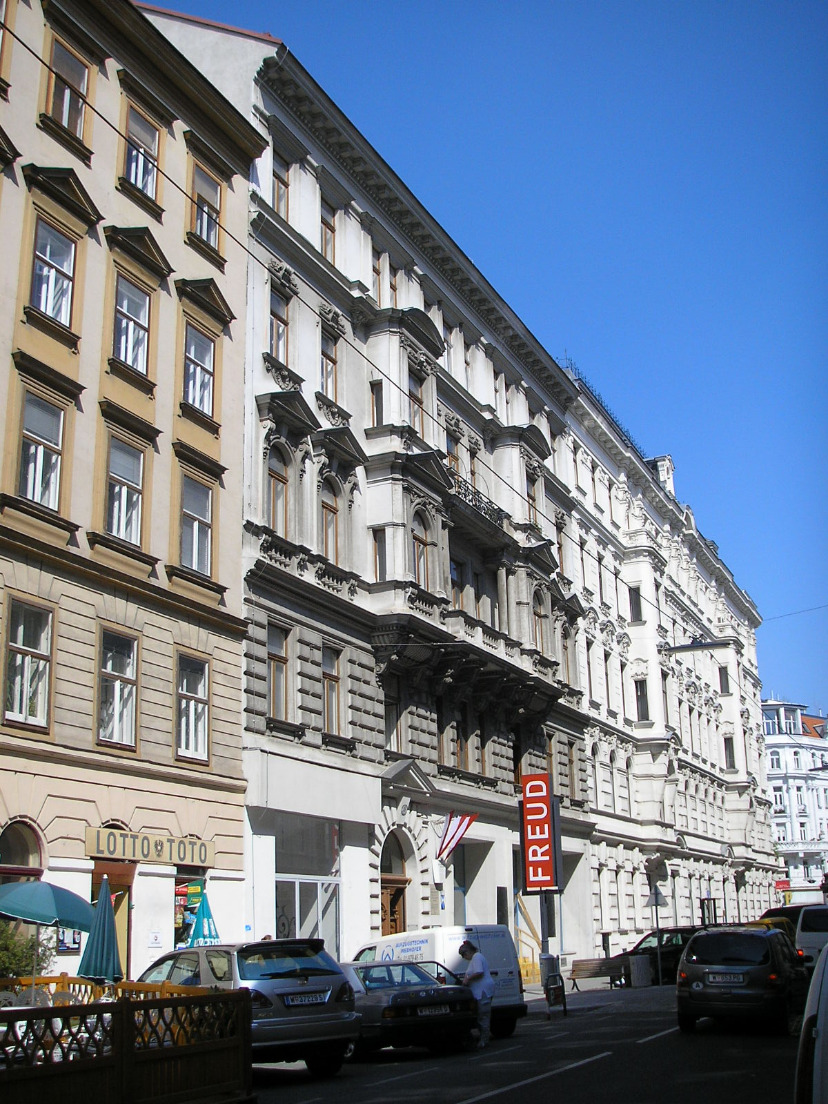 Berggasse 19 in Vienna, Sigmund Freud's house.